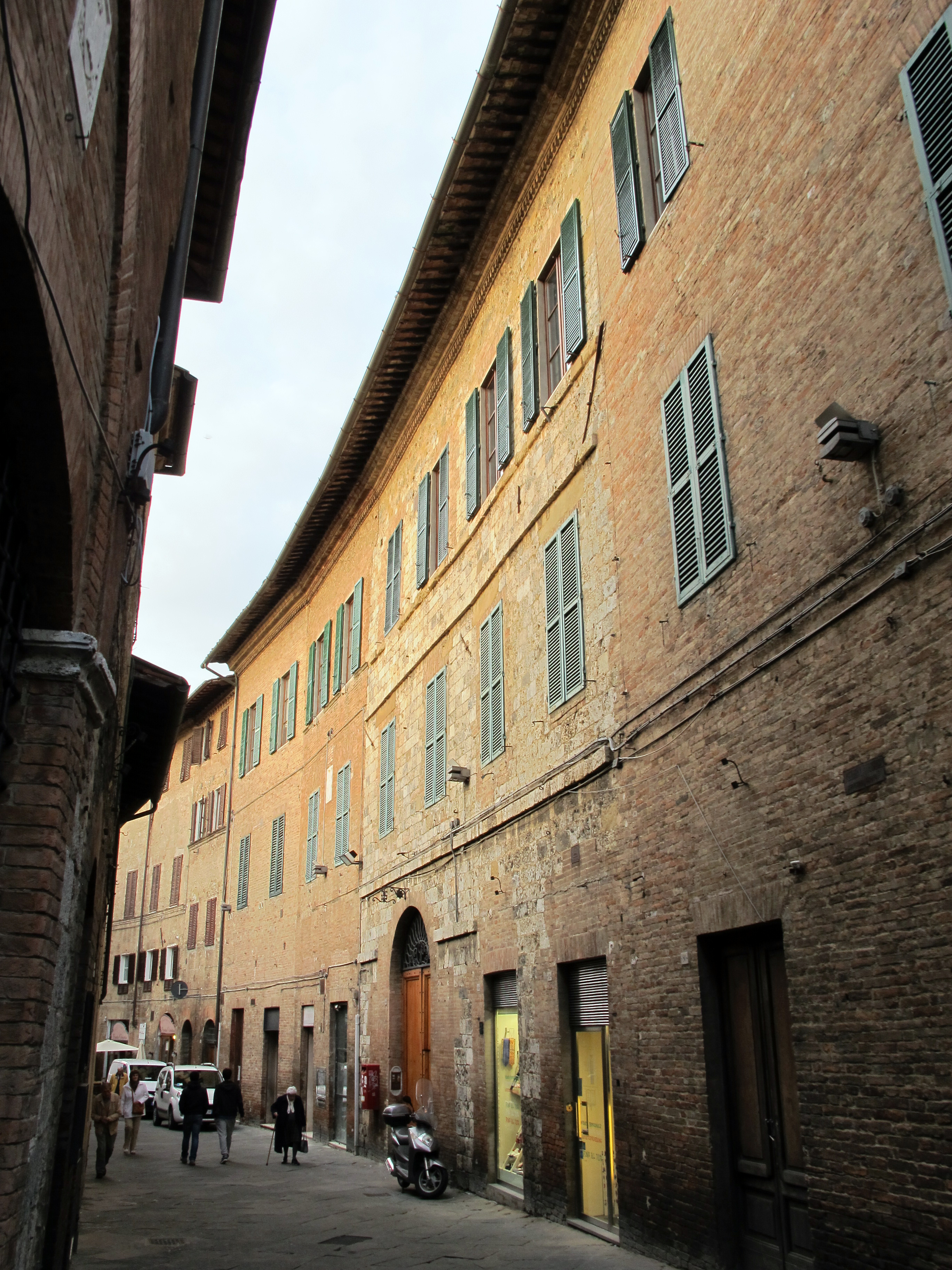 Siena